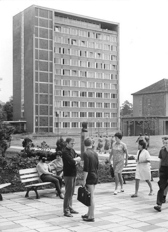 Erfurt, Pädagogisches Institut Zentralbild Demme 28.8.69-Bau - Erfurt: Pädagogisches Institut zur Hochschule ernannt - Ab 1.9.69 wird das bisherige Pädagogische Institut Erfurt Hochschule sein. Die feierliche Ernennung findet am 5.9.69 statt und wird die 16jährige Arbeit der über 600 Beschäftigten auszeichnen. Nach der Zusammenlegung mit dem Pädagogischen Institut Mühlhausen wird die Hochschule "Dr. Theodor Neubauer" Erfurt-Mühlhausen die größte Lehrerbildungsanstalt in der Republik sein. Blick auf das Internatsgebäude.